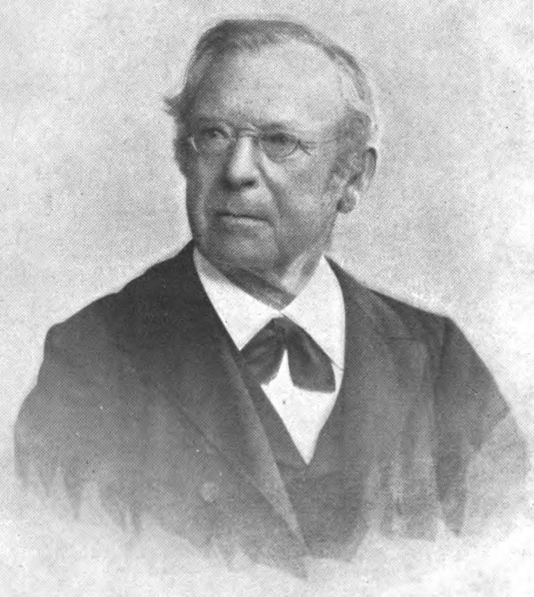 Adolf Hilgenfeld